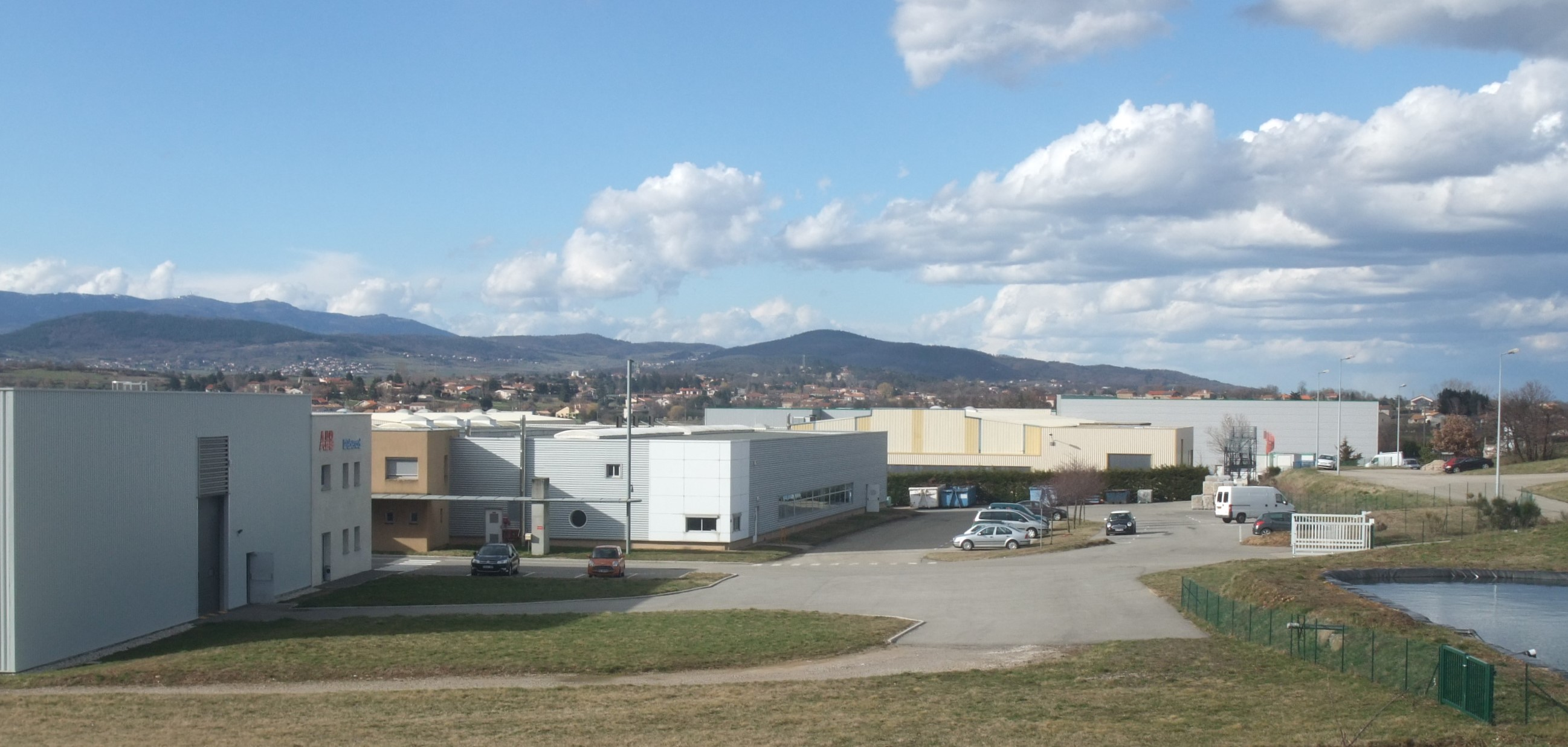 Vernosc zone des Prioux